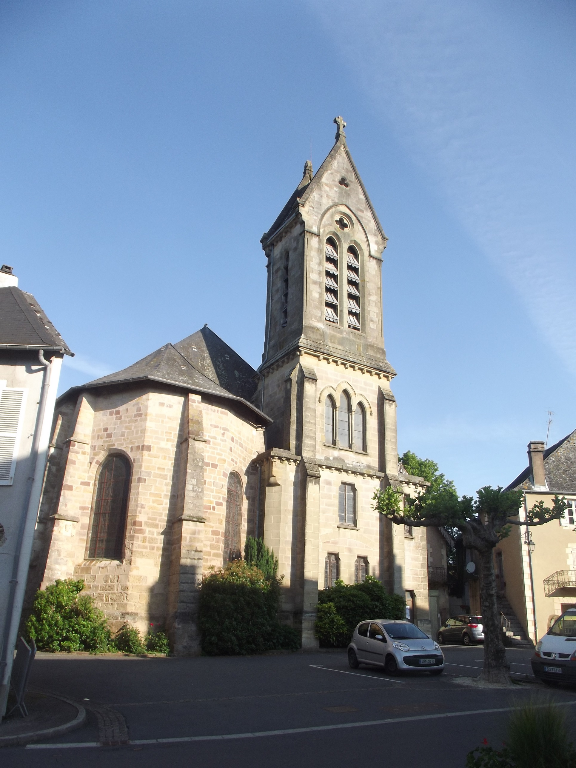 Église de Juillac (Corrèze)